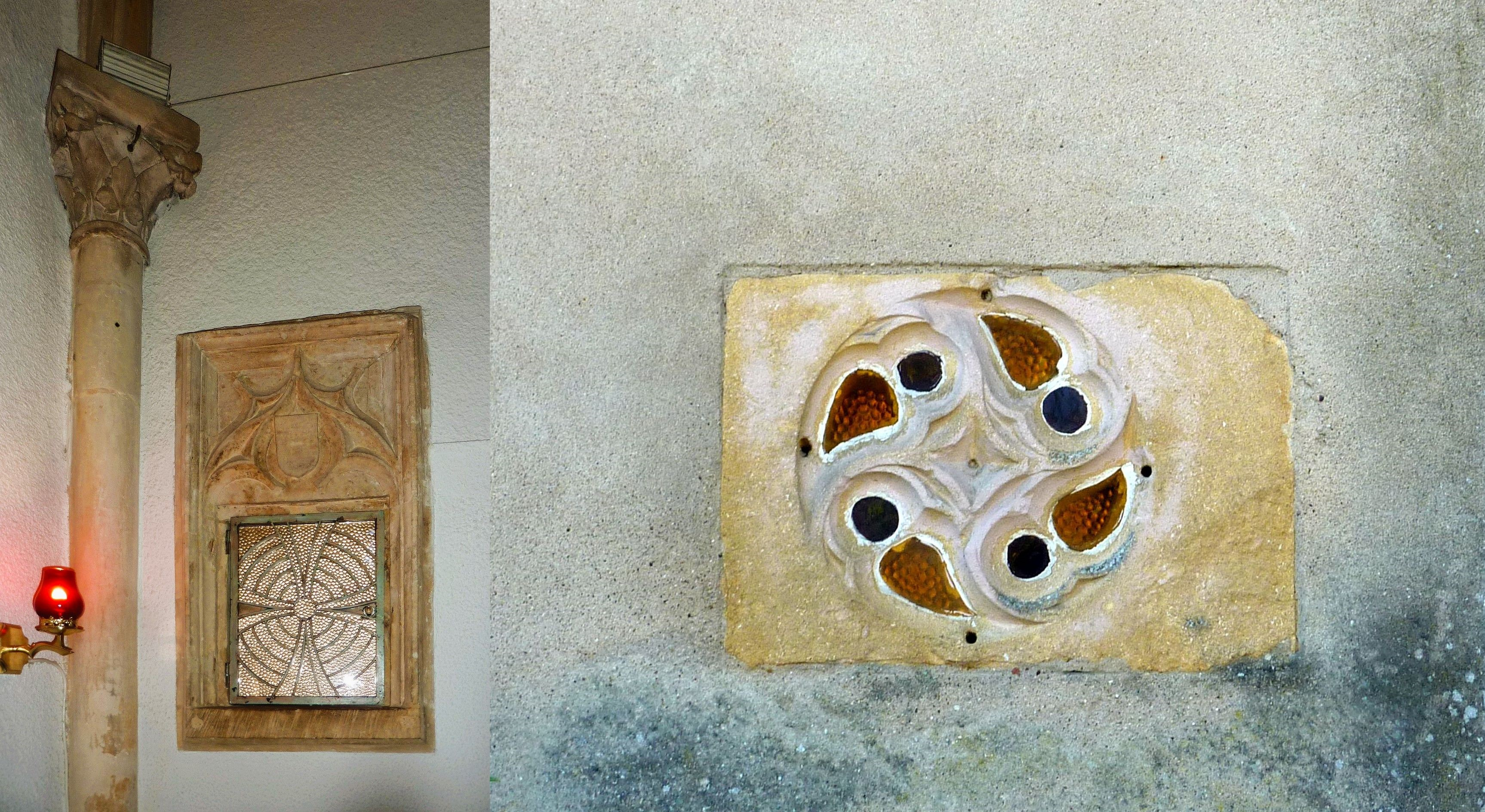 Église Saint-Pierre de Veymerange